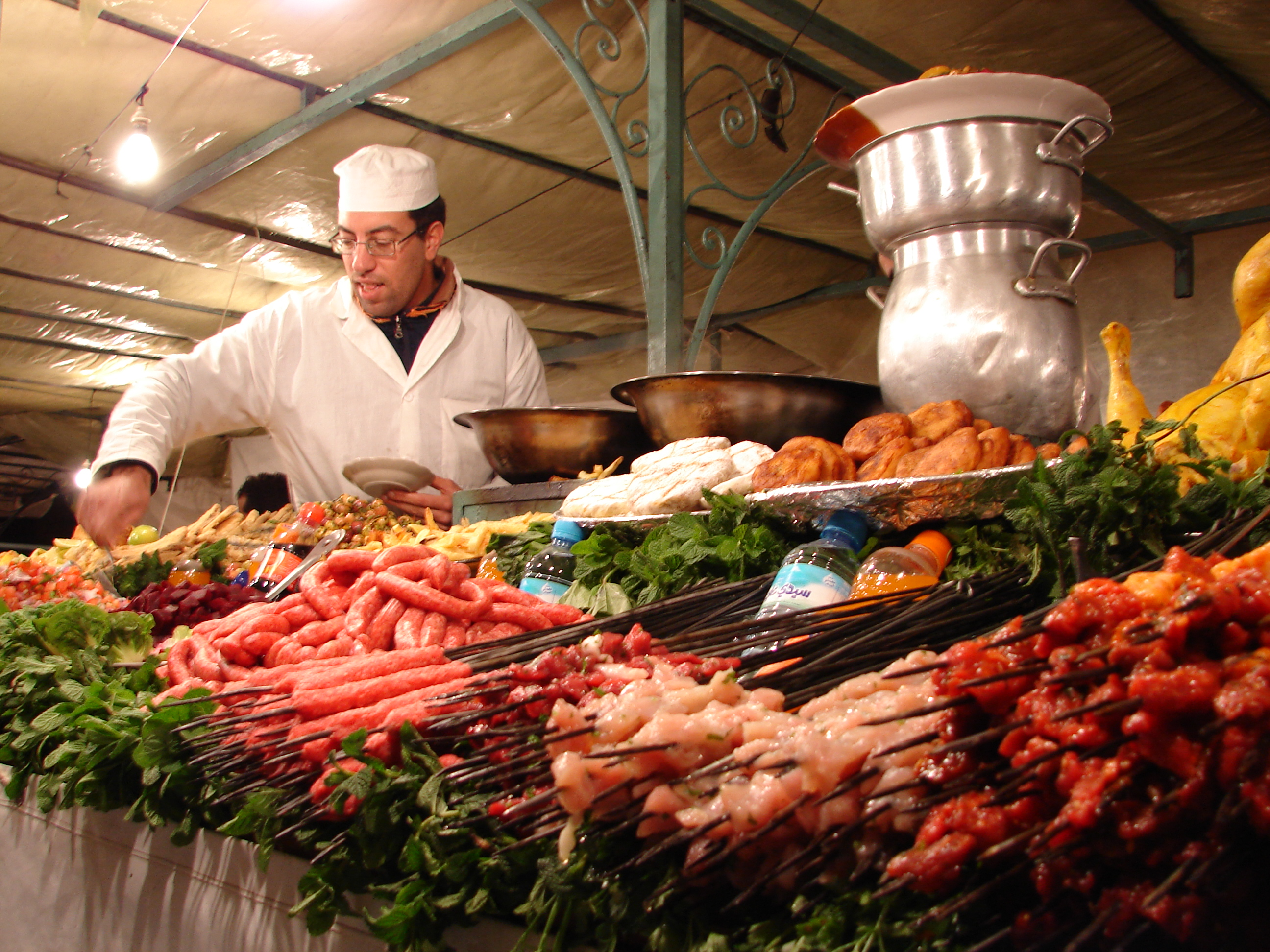 Morocco-Djemaa el Fna-Food Stall